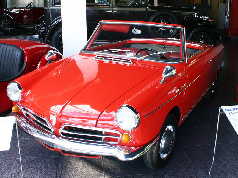 A NSU Wankel Spider from Dutch Wikipedia in EFA-Museum für Deutsche Automobilgeschichte.